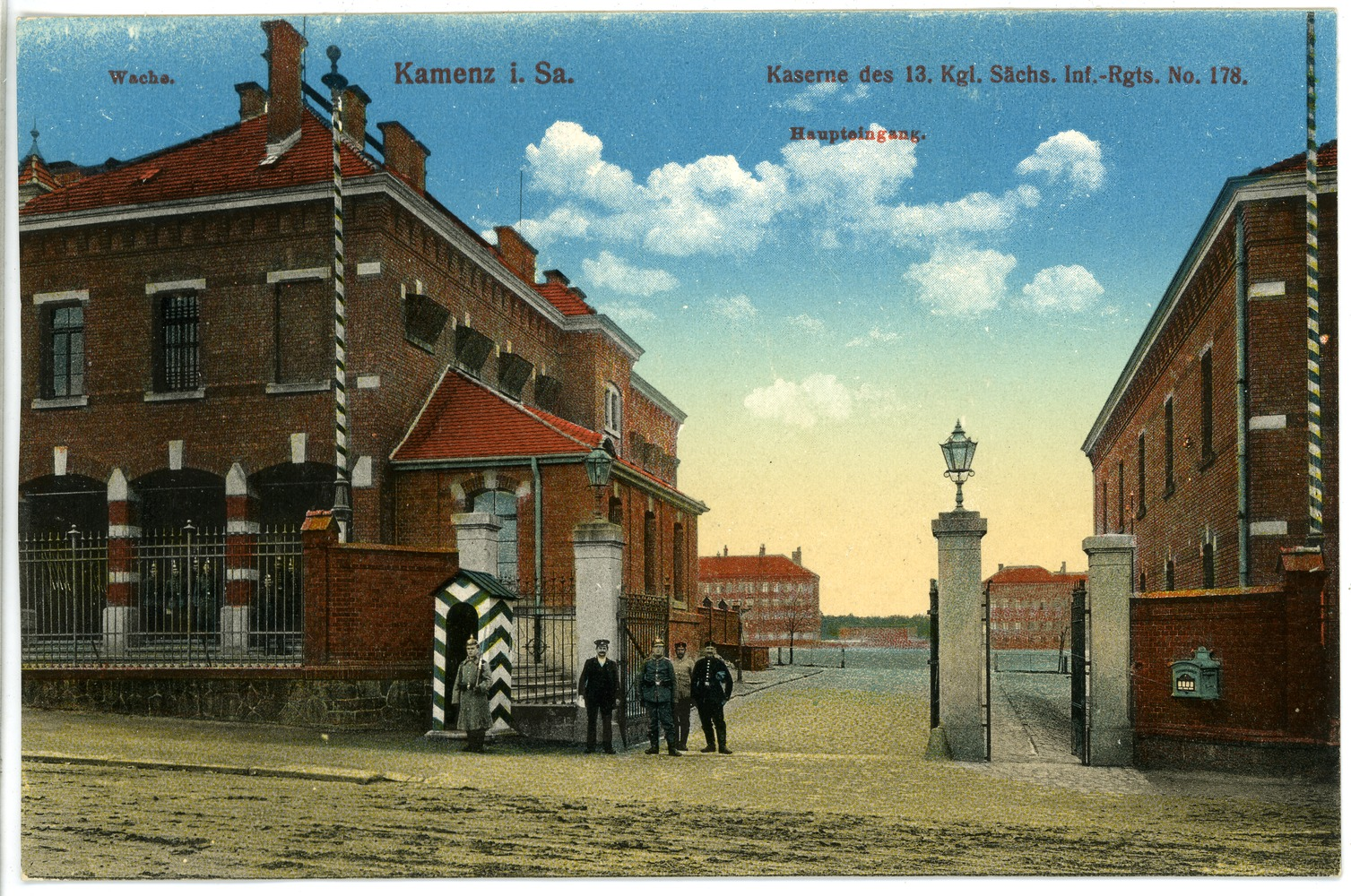 Kamenz; Kaserne des 13. Königlich Sächsischen Infanterie-Regiment Nr. 178 - Haupteingang This postcard is from publisher Brück & Sohn in Meißen ( This postcard has a unique number 18652 and is available in a higher resolution at the publisher. This images was uploaded in a cooperation project between Wikipedians and the publisher.